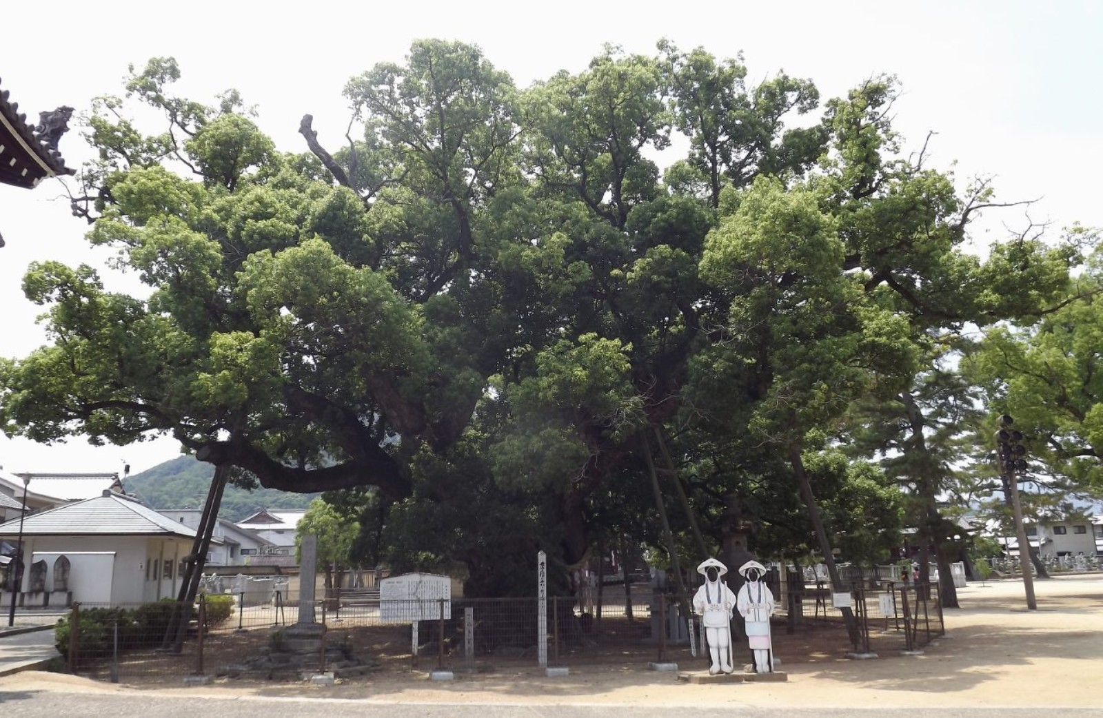 善通寺の大楠